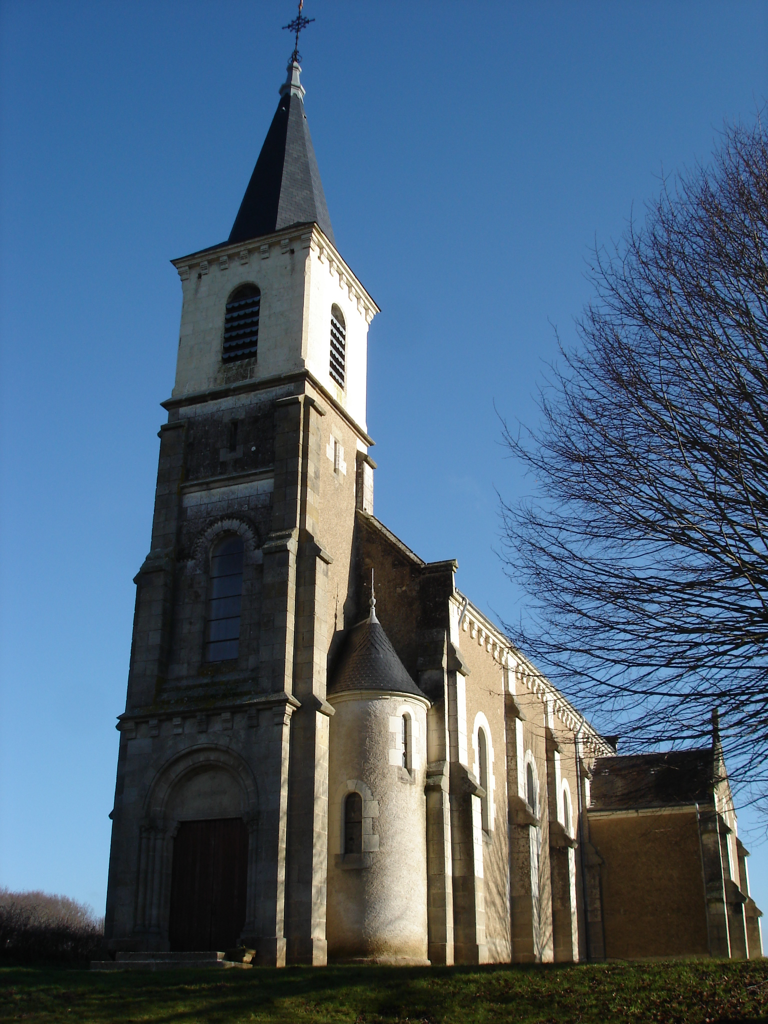 Lignerolles (36) : L'église.